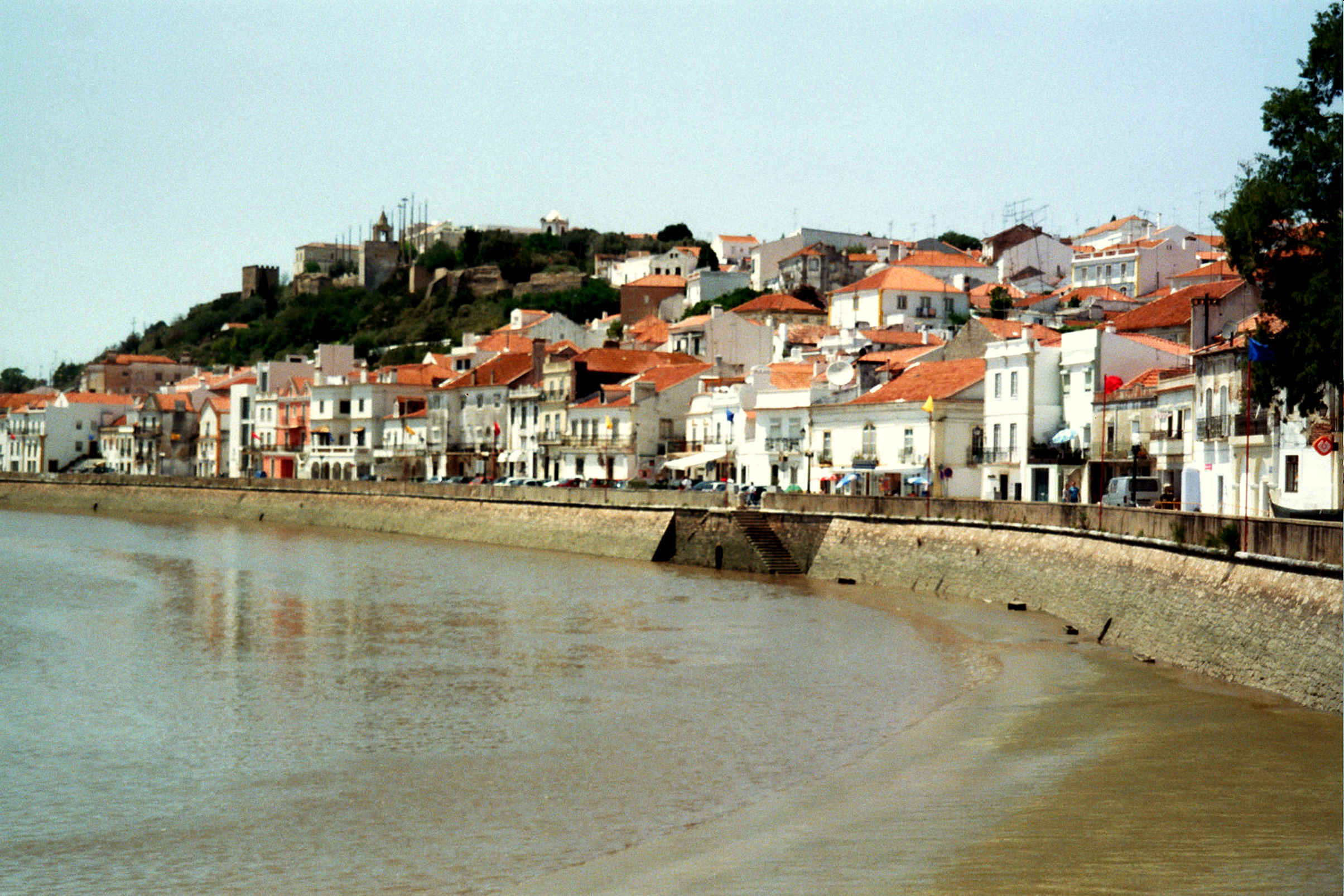 Alcacer do Sal (Portugal)